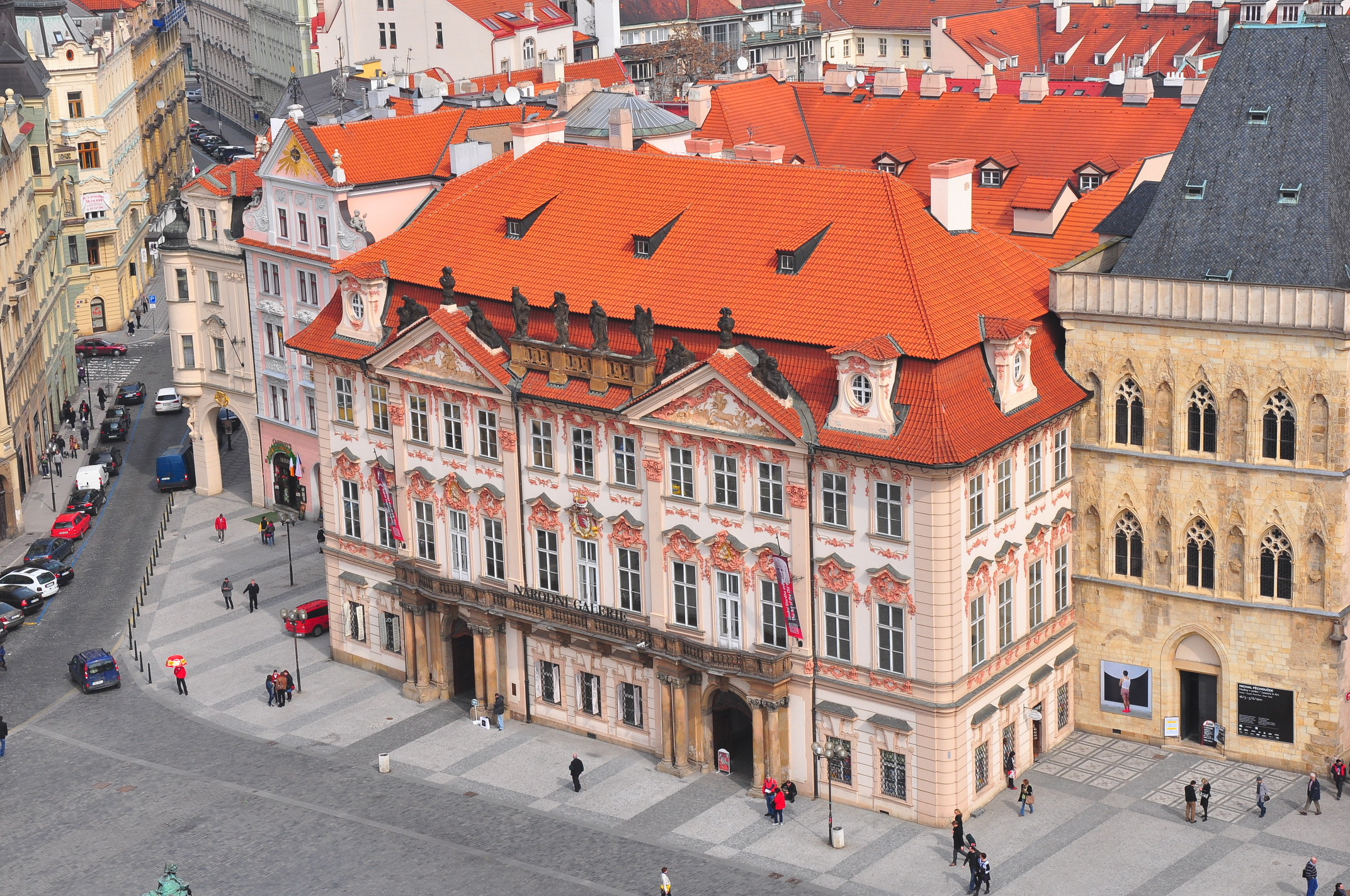 Praha - Palác Goltz-Kinských